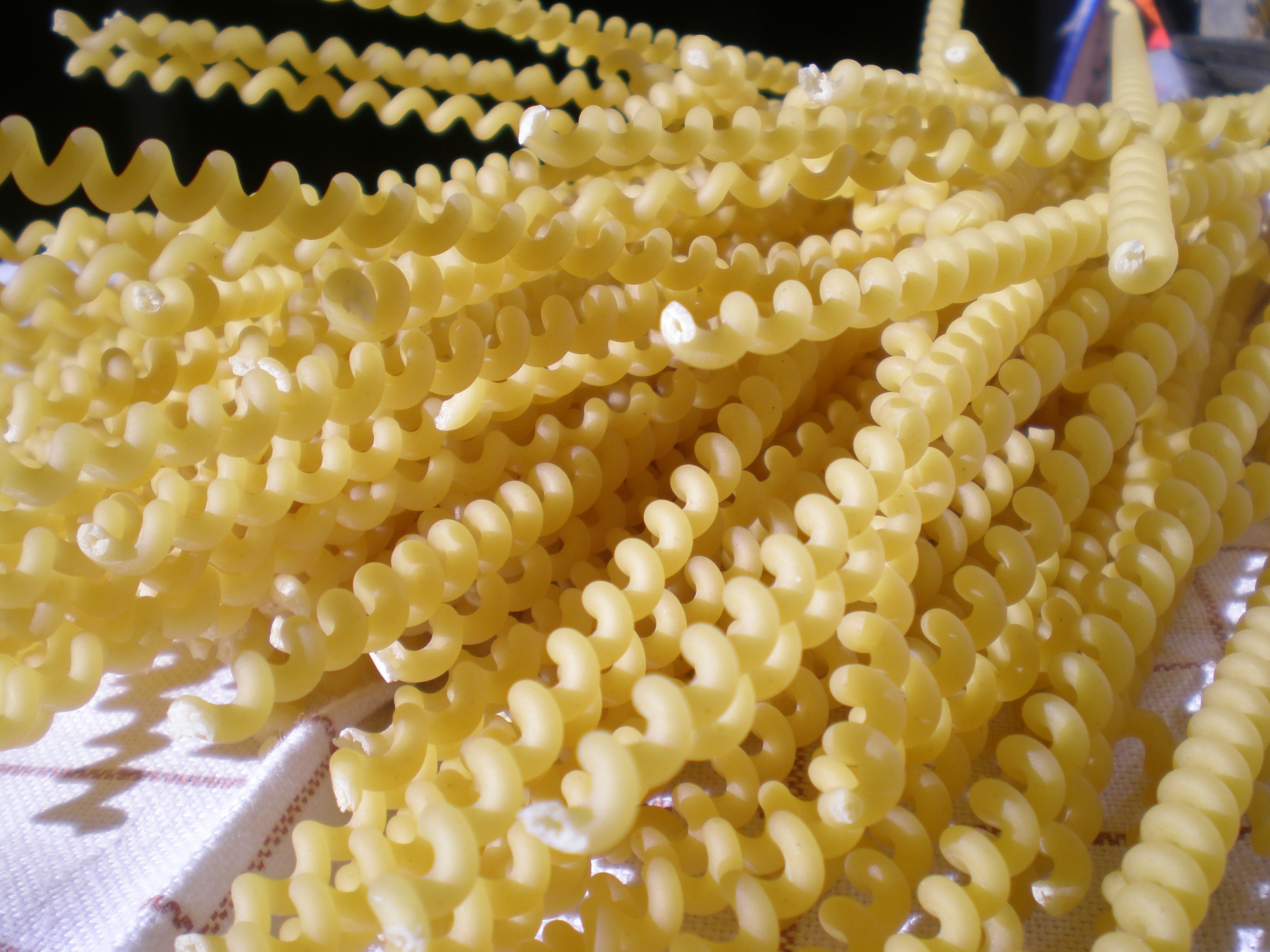 Fusilli lunghi bucati